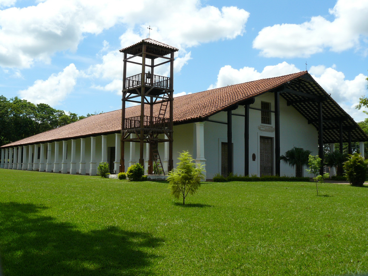 Fotos tomadas por mí, a inicios del año 2008 costado de la iglesia de yaguaron